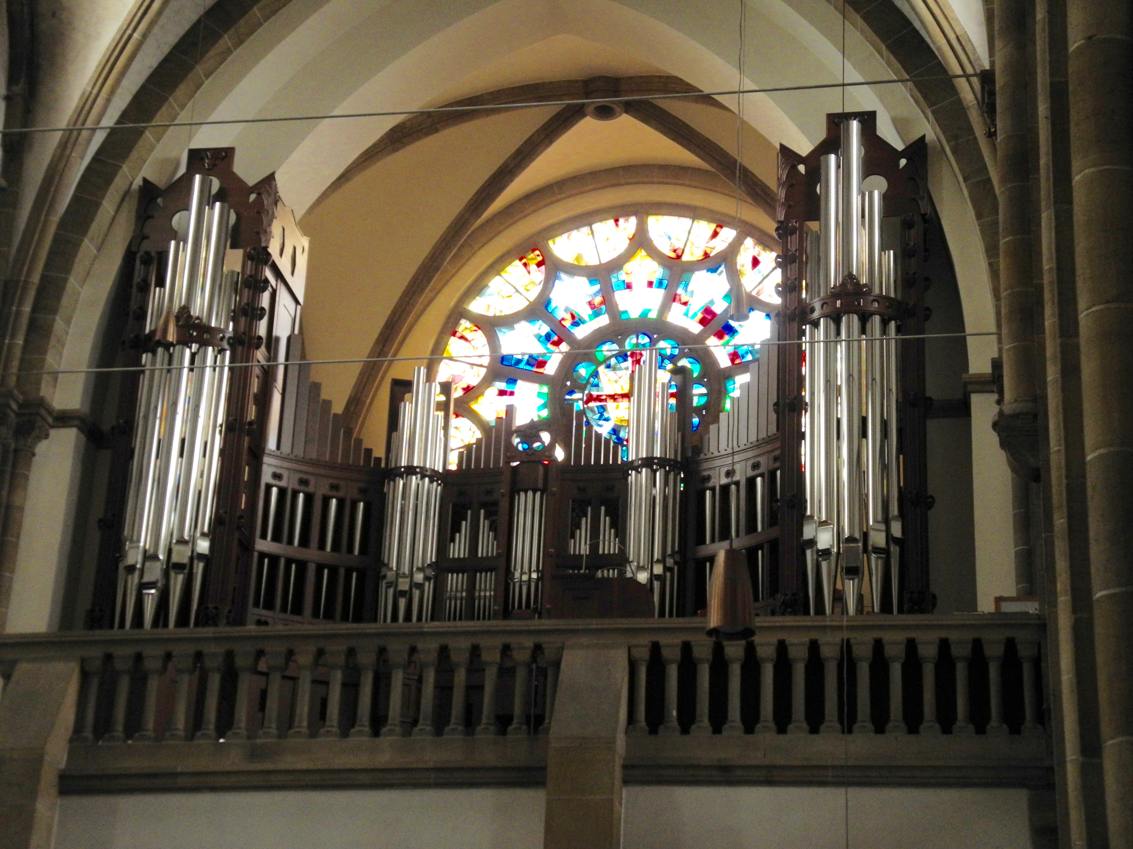 Stadtpfarrkirche St. Maria (Landau in der Pfalz), Steinmeyer-Orgel von 1924